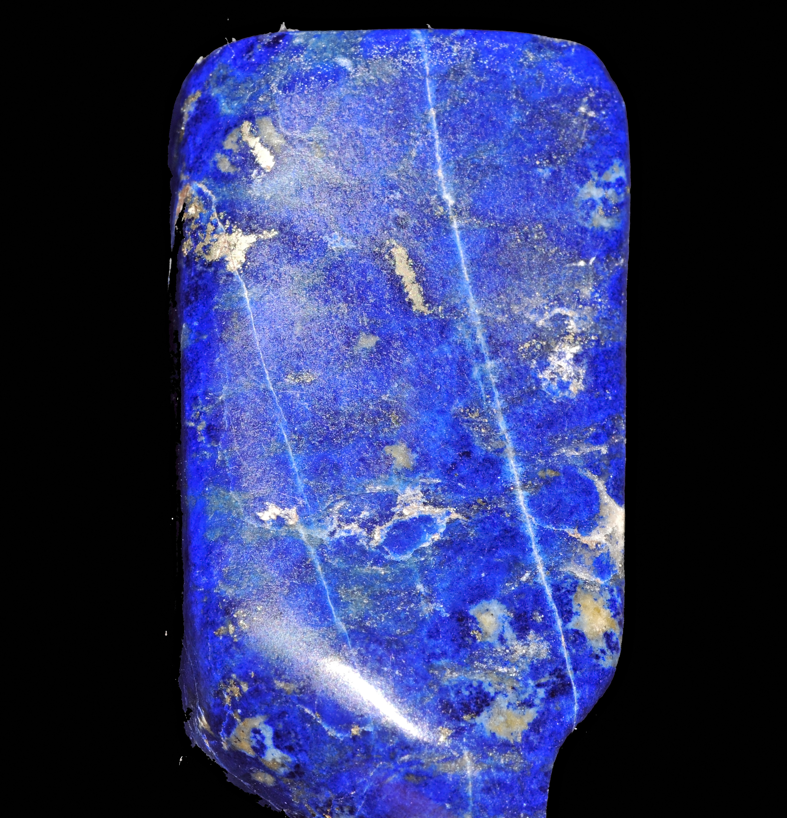 lazurite polie avec pyrite et calcite